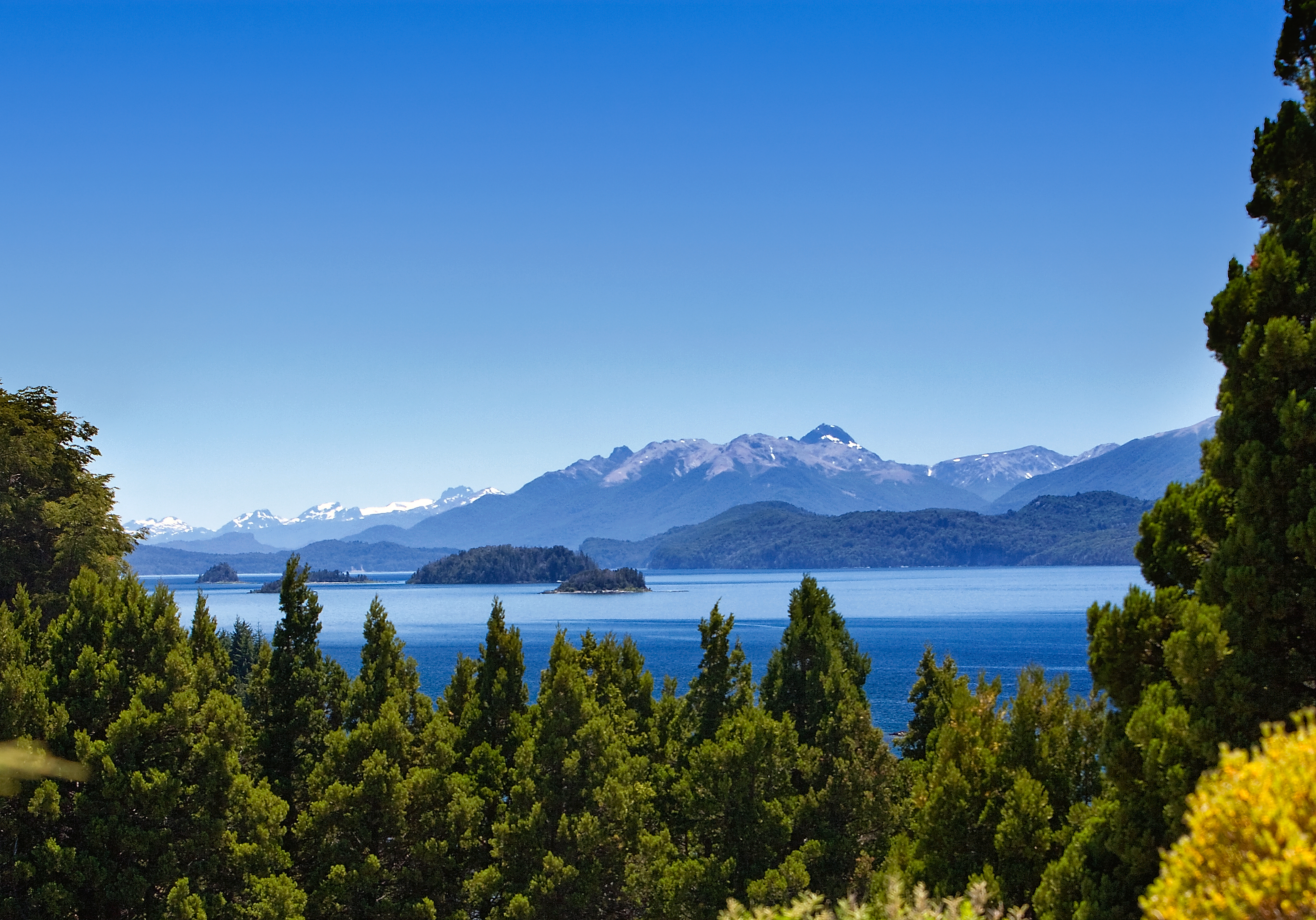 Lake Nahuel Haupi (Argentina)